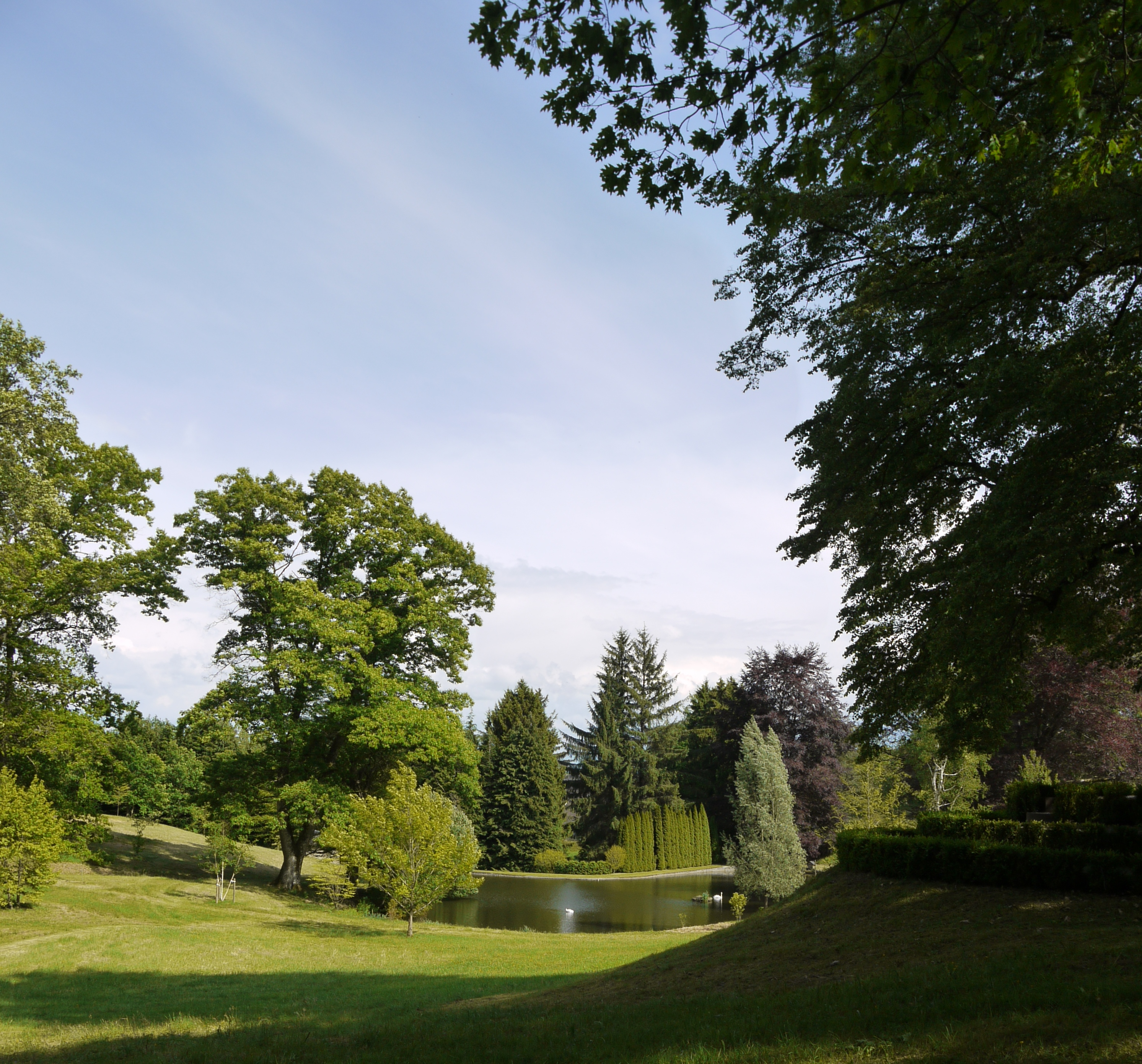 Historical garden in french Limousin Neuvic d'Ussel